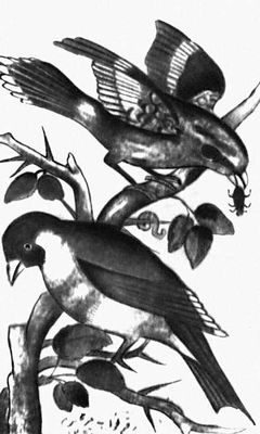 Birds